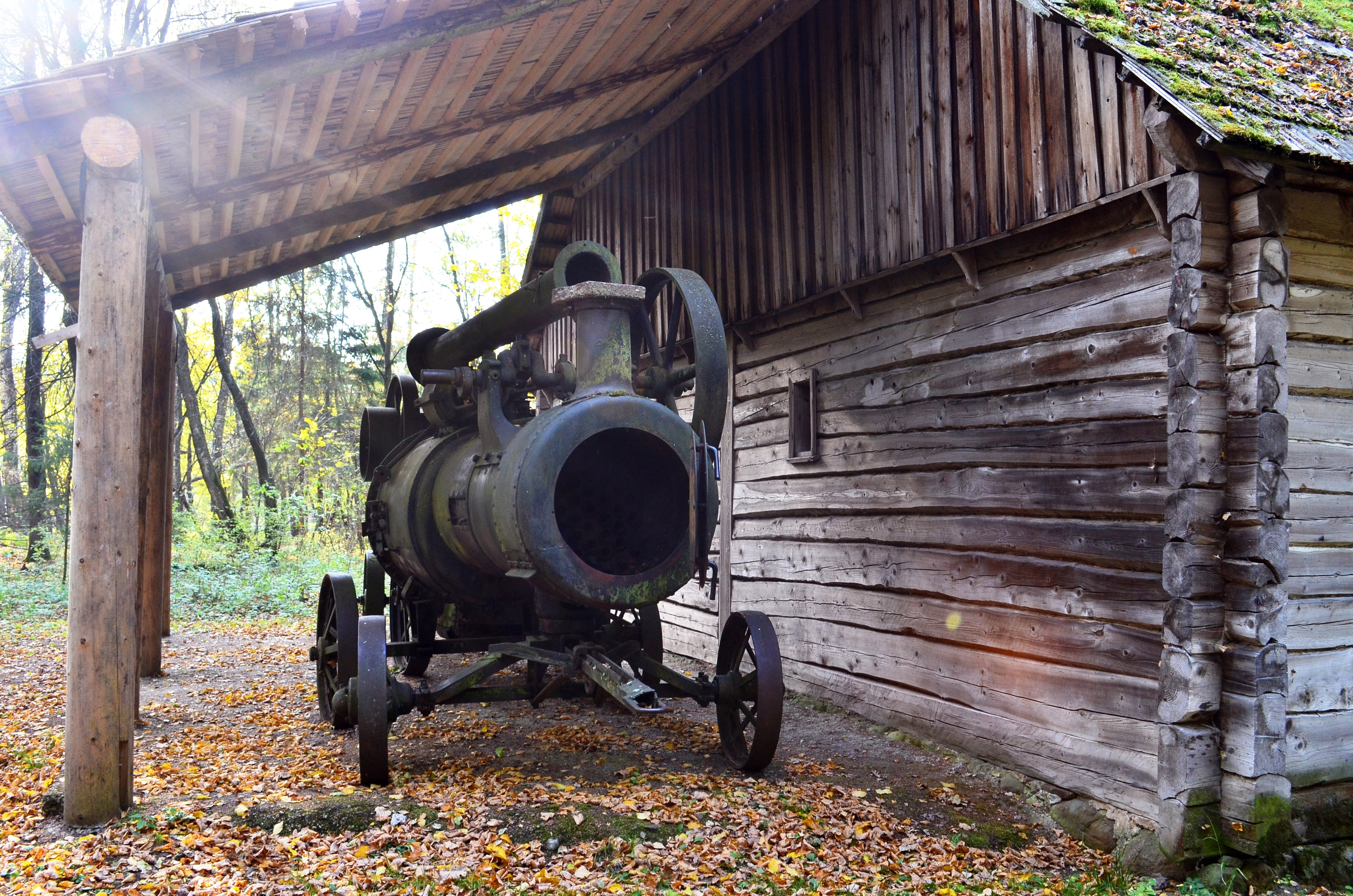 Aliejaus spaudykla iš Šakių raj., Rumšiškių muziejus